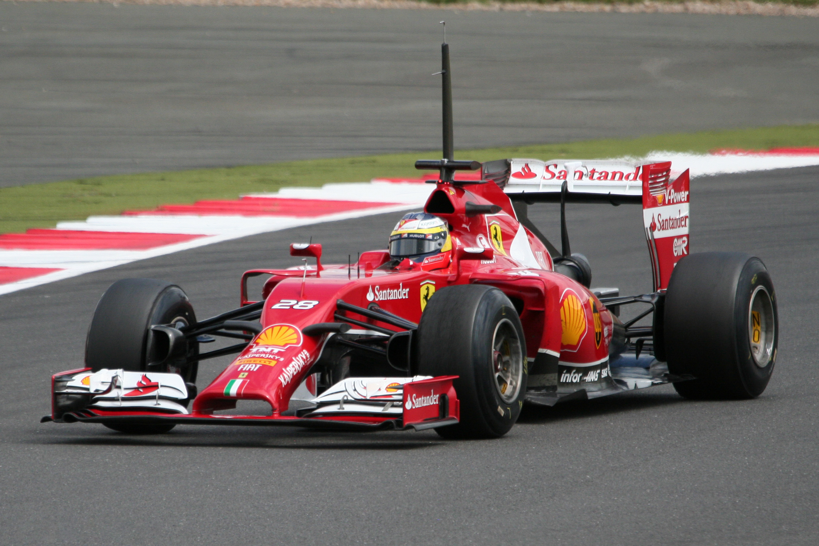 Photographie de la Ferrari F14 T de de la Rosa aux essais sur le circuit de Silverstone en 2014.